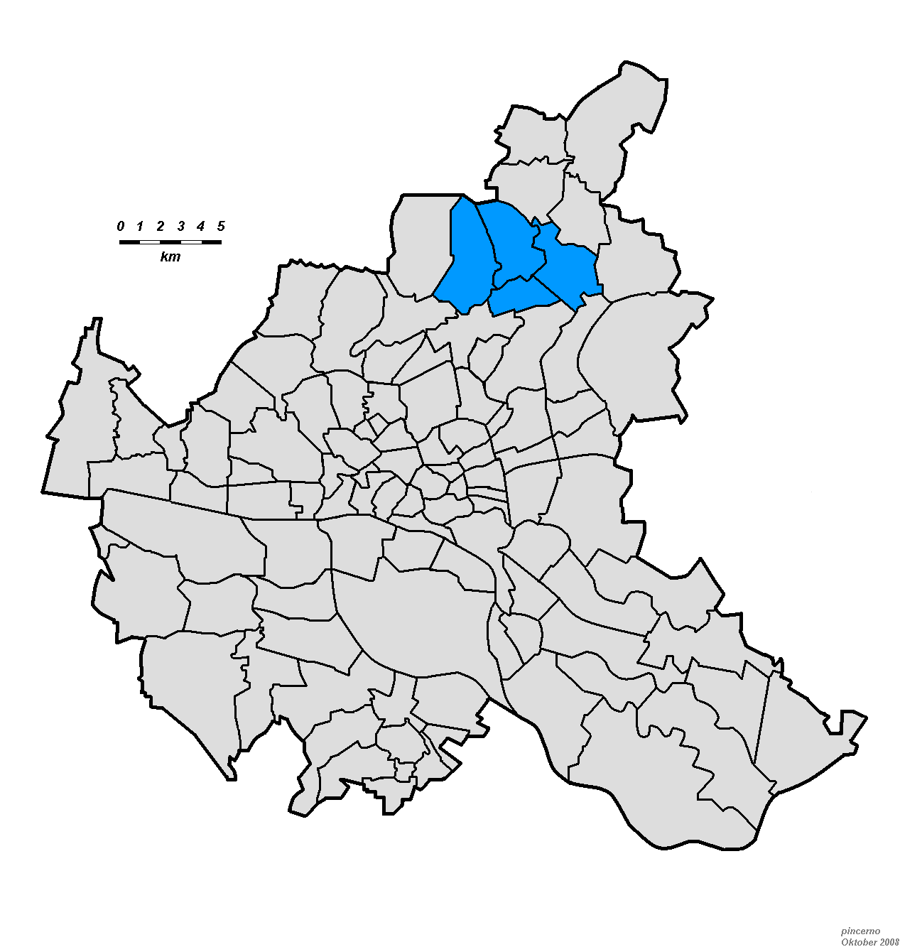 Lage des ehemaligen Ortsamtsgebietes Alstertal in Hamburg